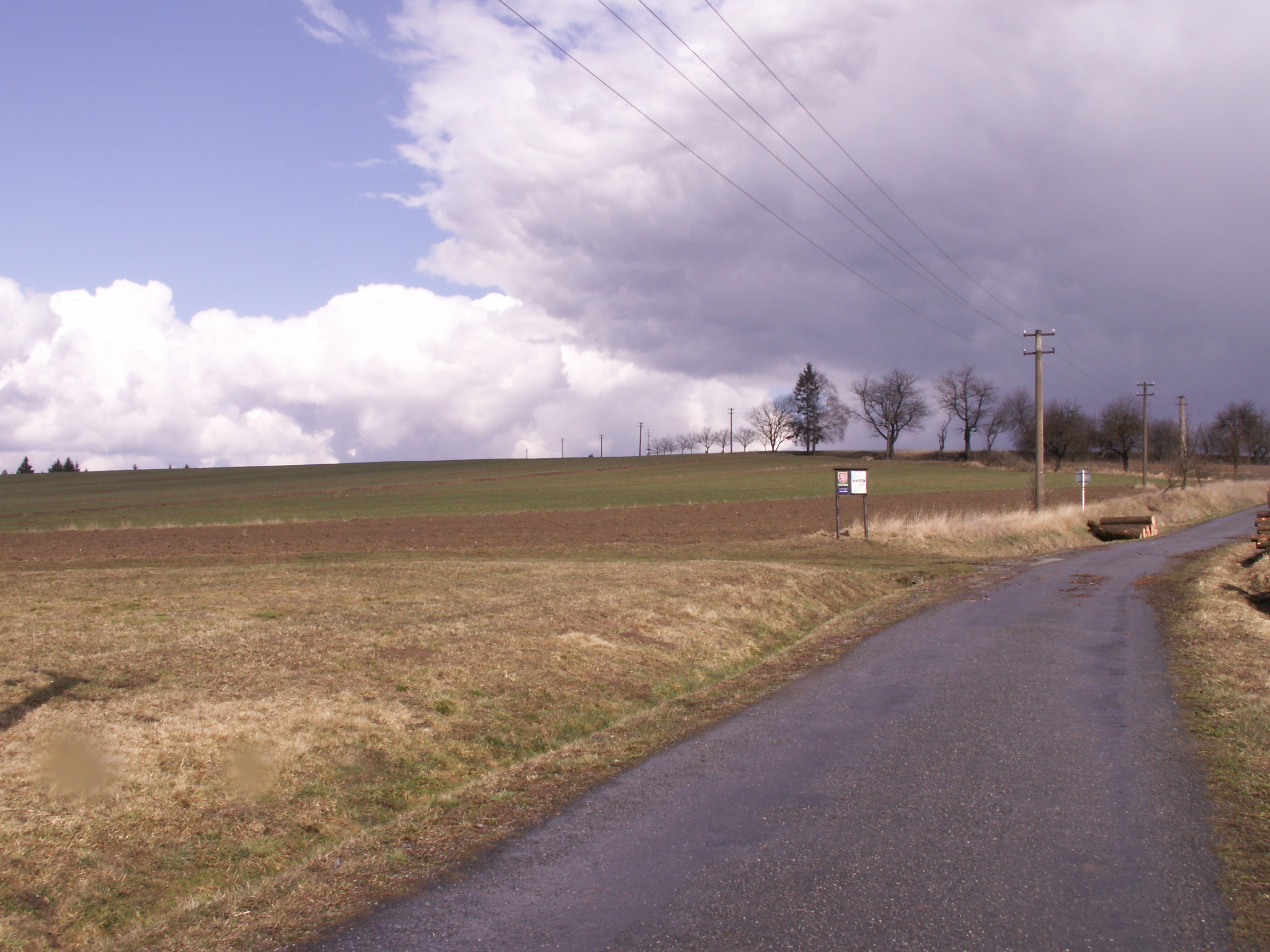 PP Ouperek - okres Žďár nad Sázavou, mineralogické naleziště